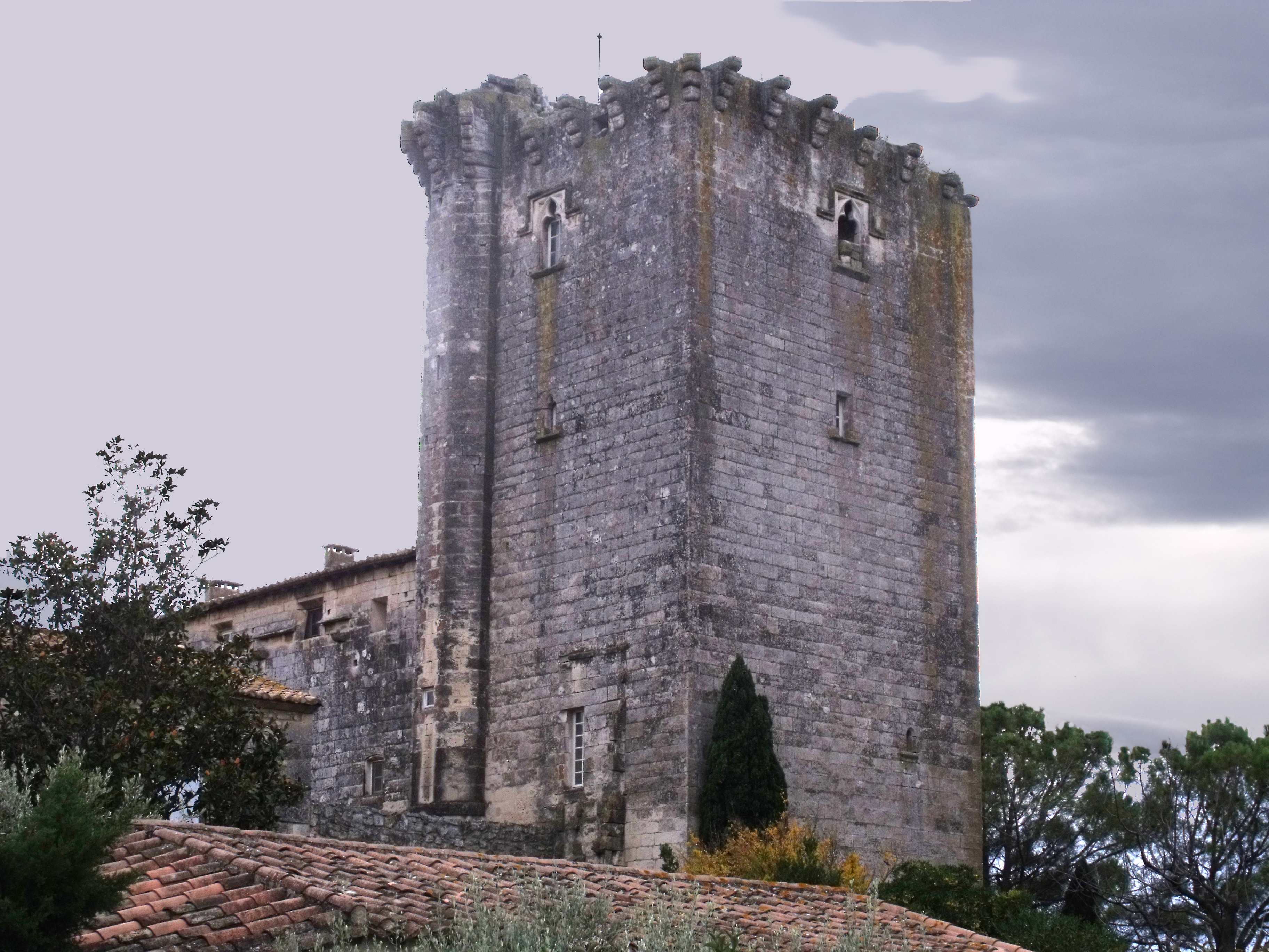 Tour des Abbés (Fontvieille, Bouches-du-Rhône, France).